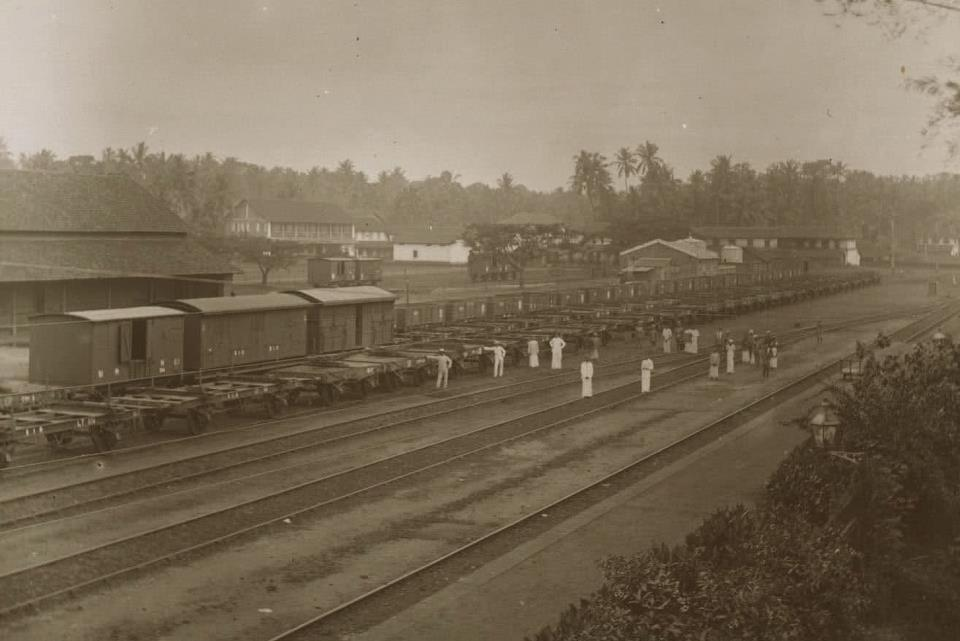 കോഴിക്കോട് തീവണ്ടി സ്റ്റേഷന്റെ ചിത്രം.